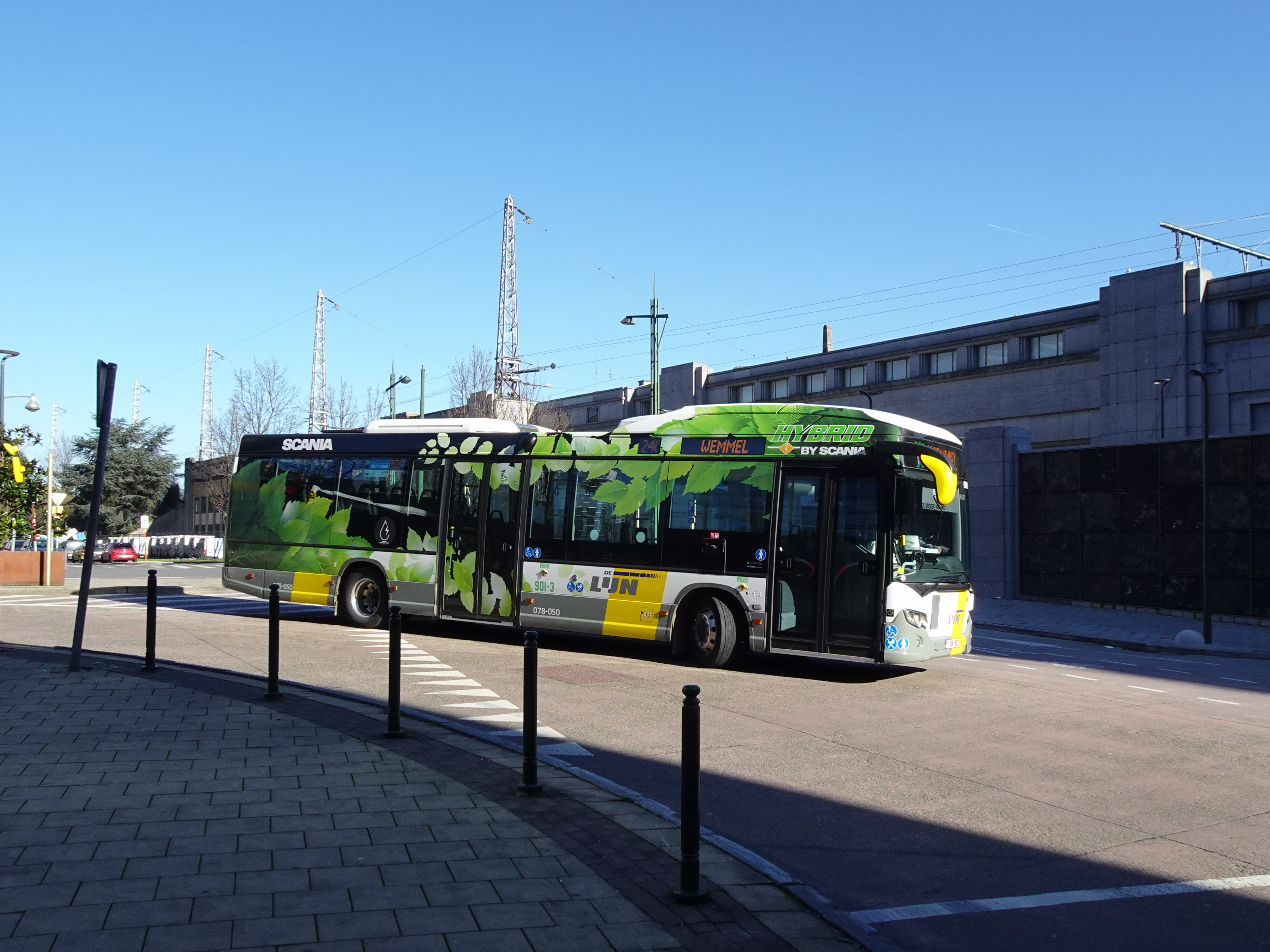 Prototype Scania Citywide LE Hybride en livrée spéciale au terminus de la gare du Nord.